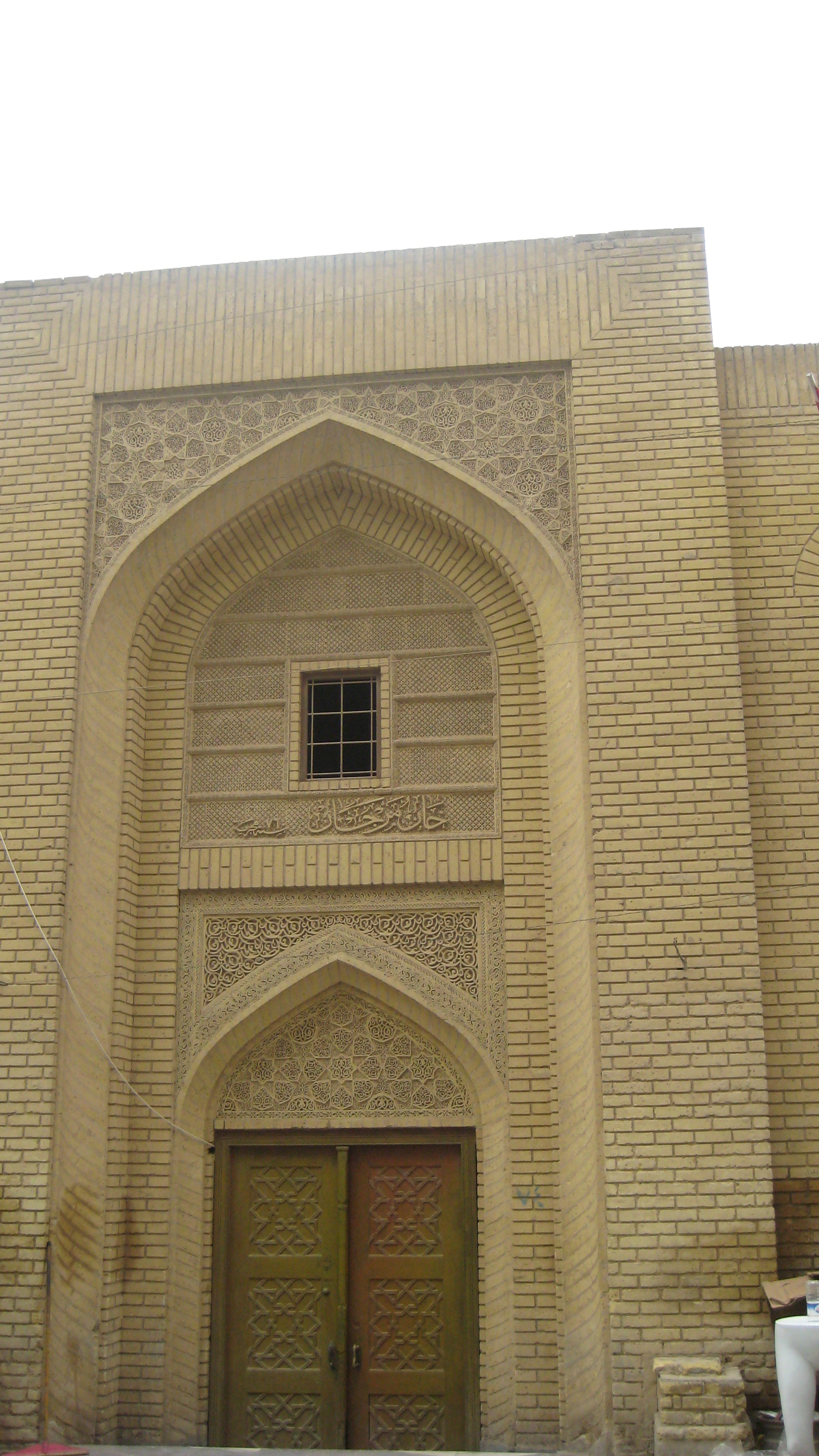 بوابة خان مرجان من جانب شارع السموأل في جانب الرصافة من مدينة بغداد